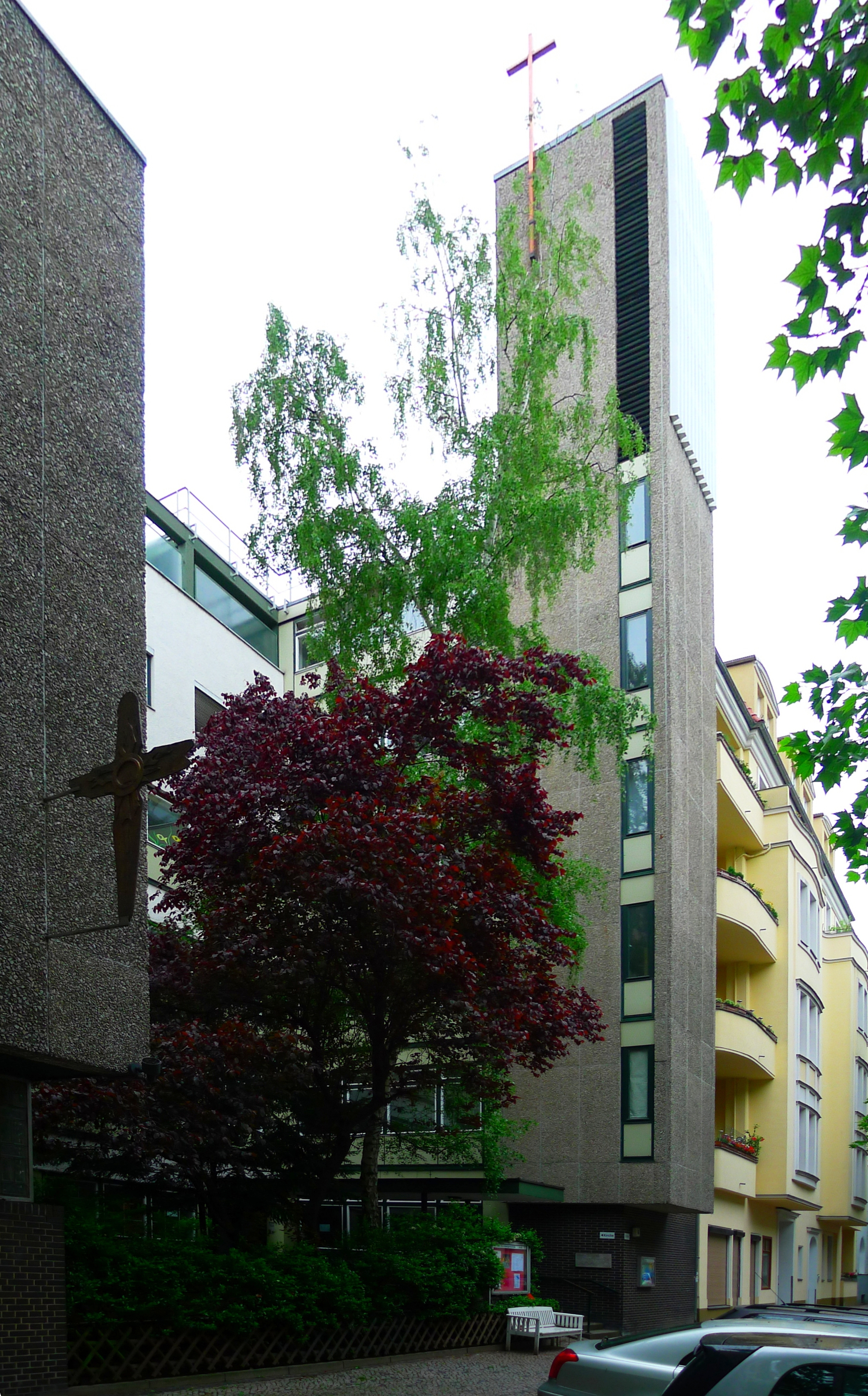 Blick nach Nordwest auf die Kirche